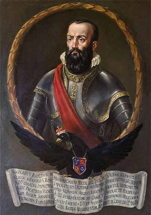 Беларуская (тарашкевіца): Партрэт Мікалая Радзівіла «Чорнага» (Mikałaj Radzivił «Čorny»)